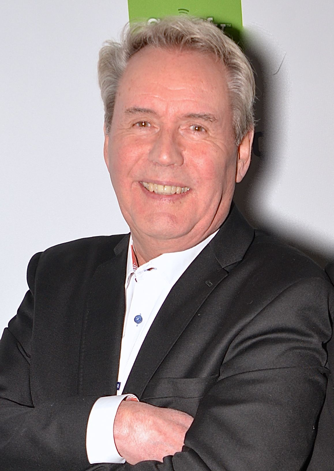 Sten Nilsson på Grammisgalan på Cirkus, Stockholm den 20 februari 2013.